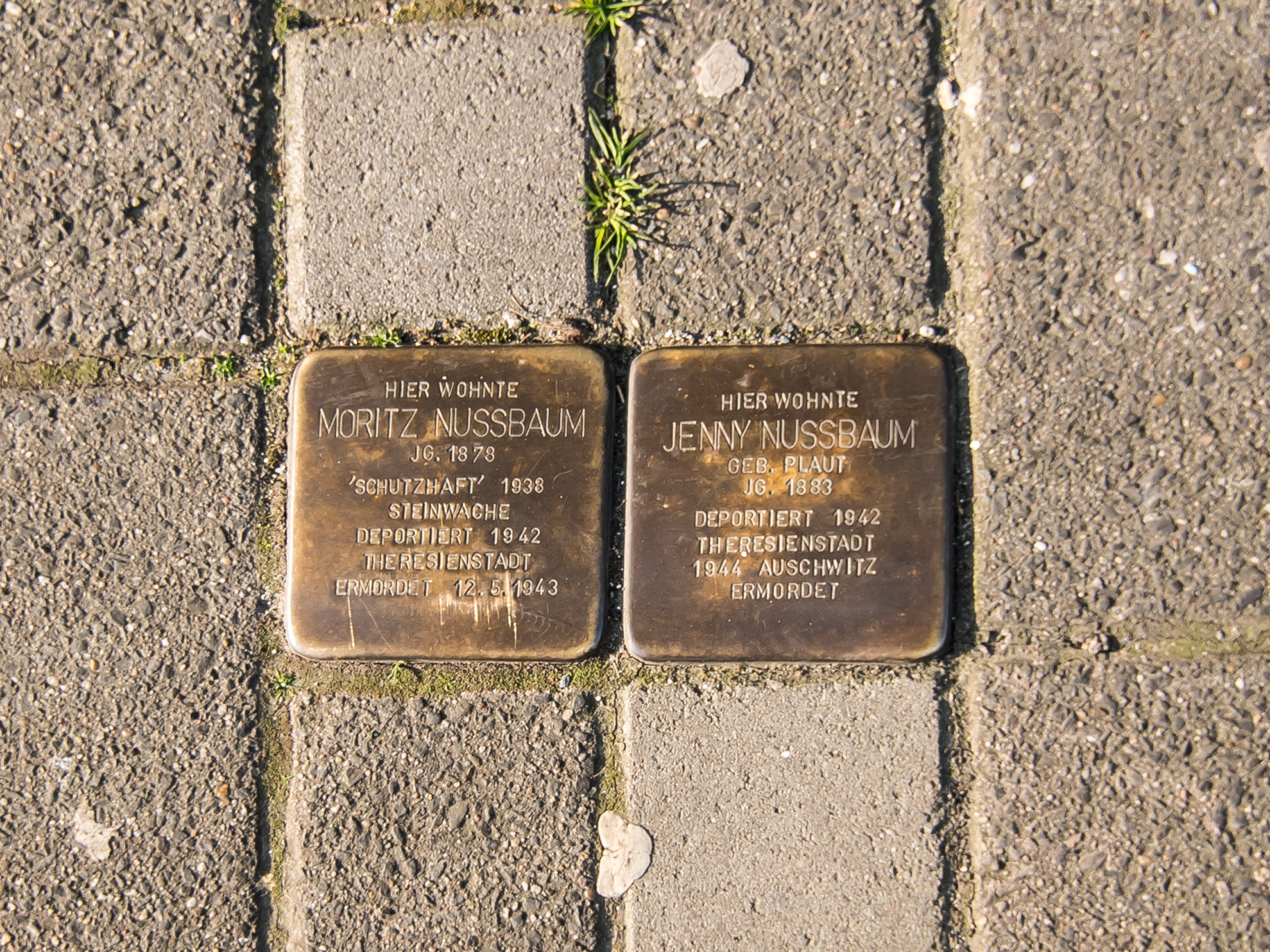 Stolpersteine und Wohnhaus von Jenny und Moritz Nußbaum